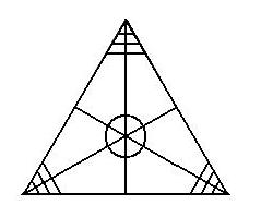 中文（台灣）: 福建寧德、寿宁的狀元棋